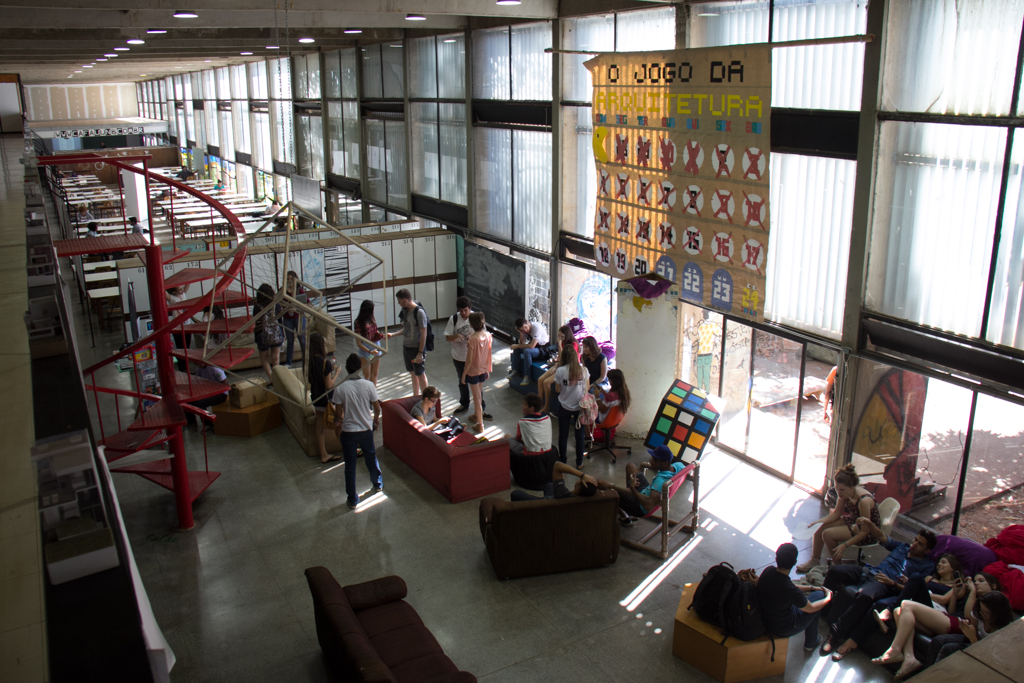 Foto: Murilo Abreu